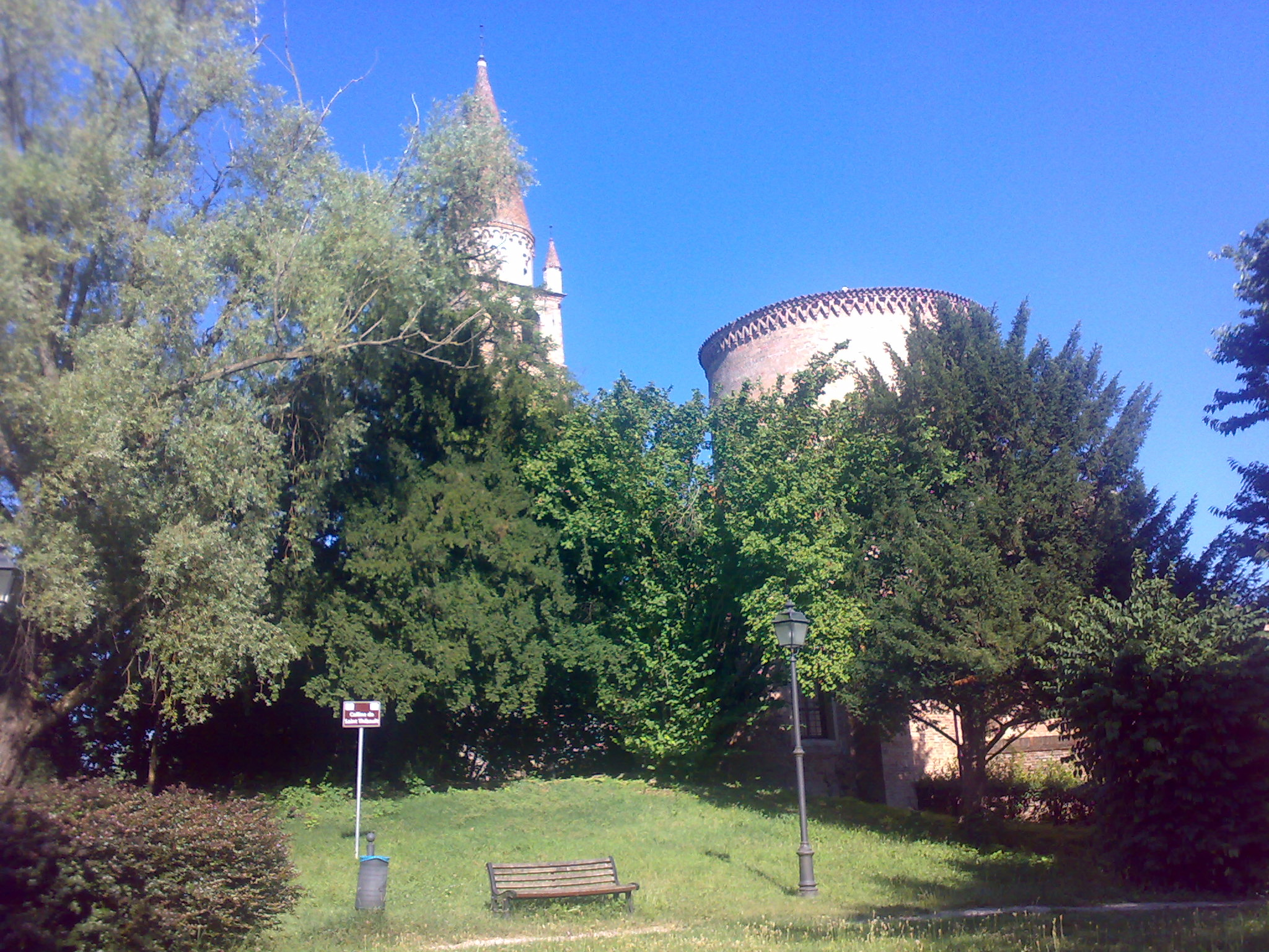 Badia Polesine, vista dell'Abbazia della Vangadizza dagli adiacenti giardini pubblici.